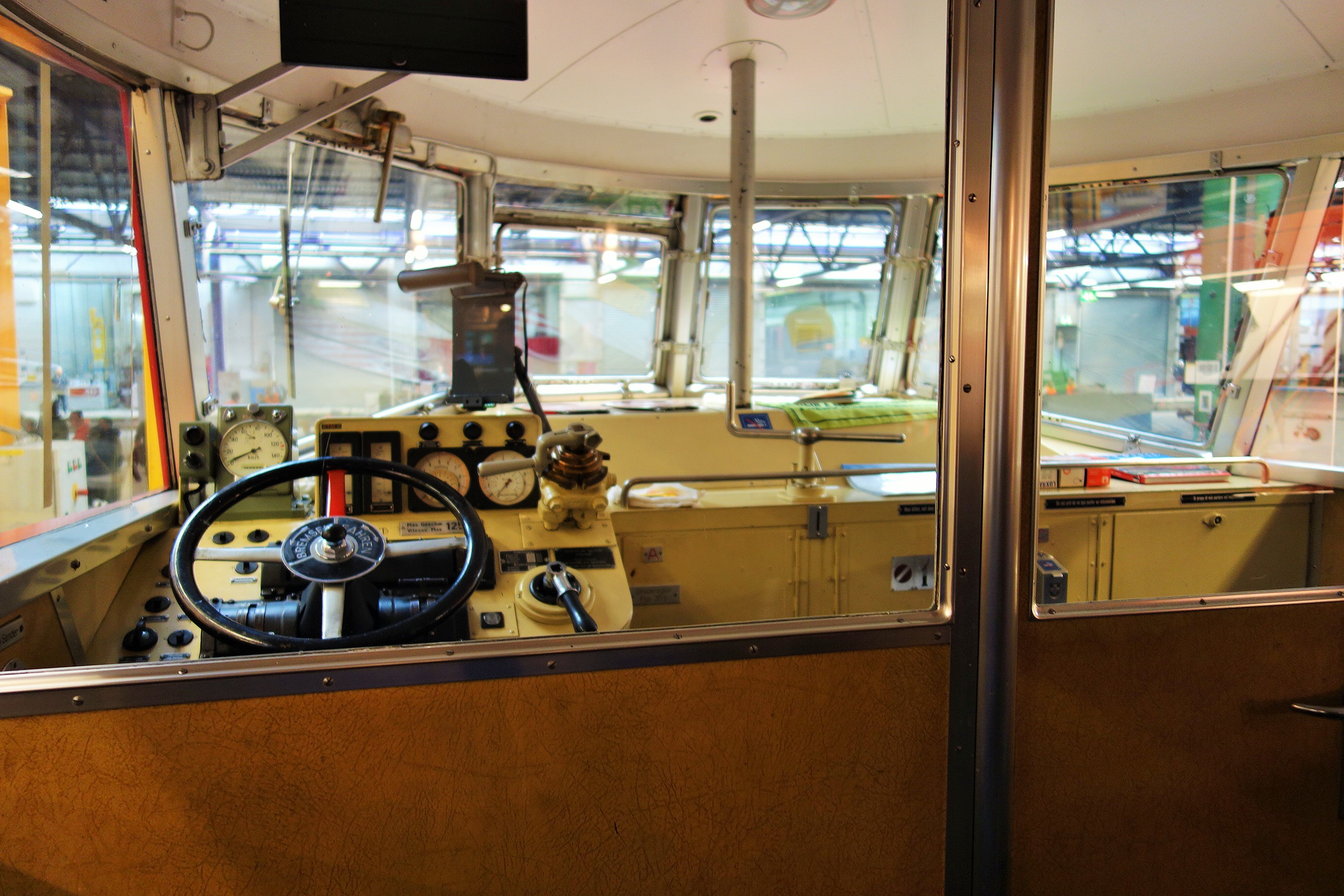 SBB Industriewerk Olten, Schweiz: Tag der offenen Tür 30. März 2019